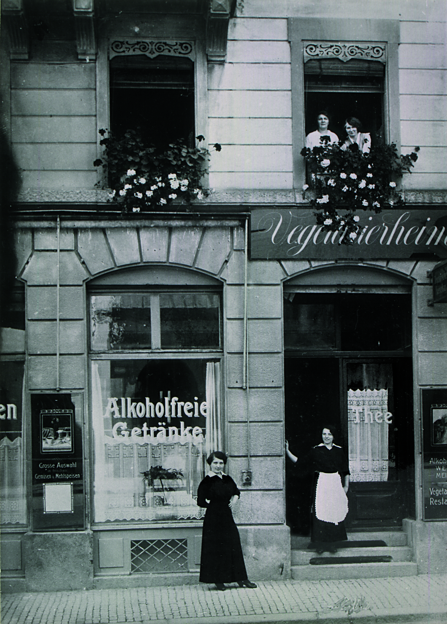 Eingang Vegetarierheim um 1900